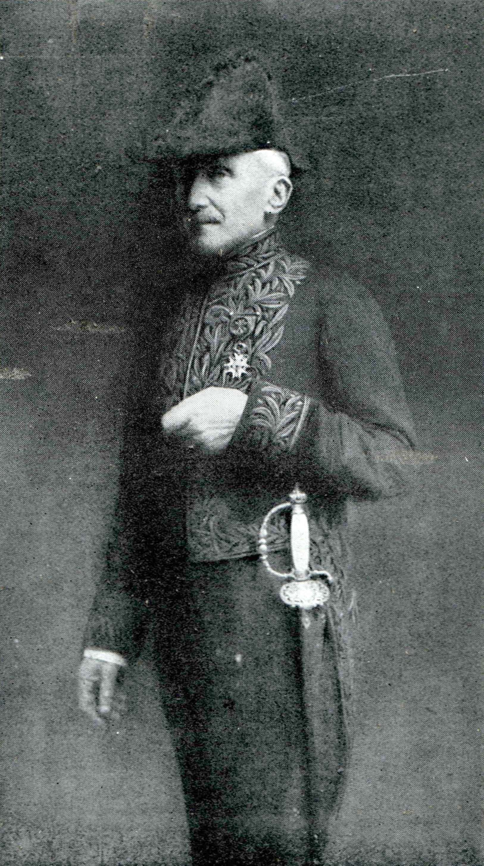 Scan of L'ILLUSTRATION No 3909. No 3909 Page 103, M. Henri Bergson, le jour de sa réception.